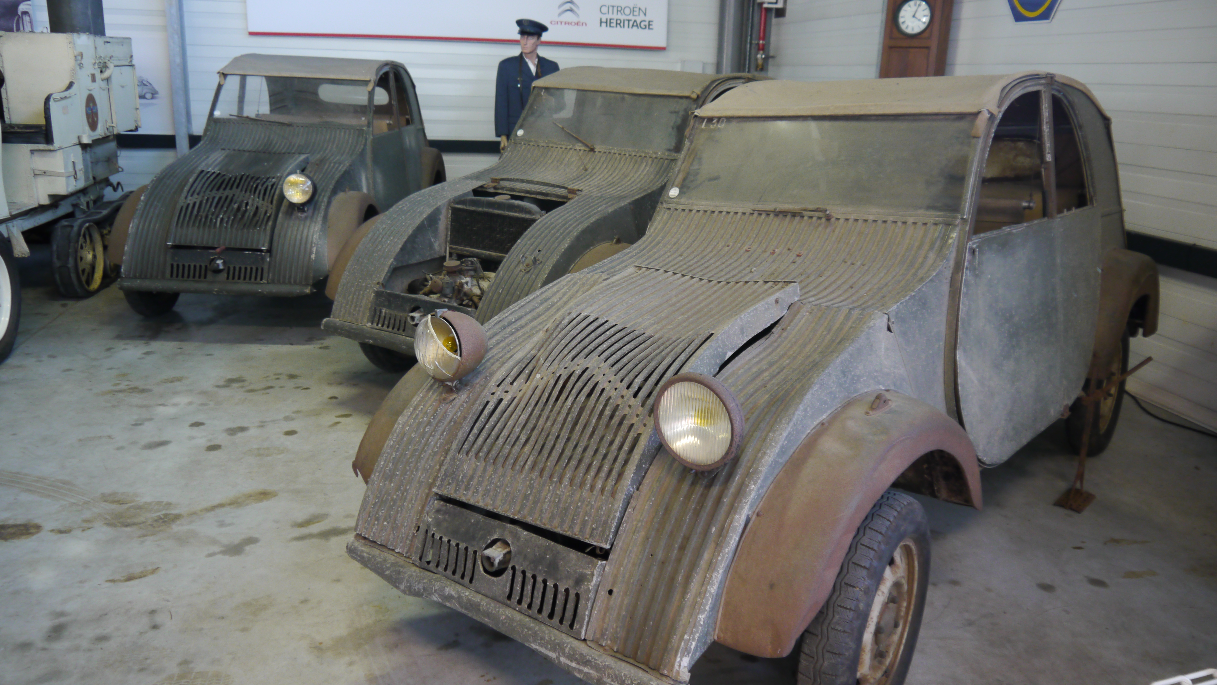 Conservatoire Citroen 076 Citroen 2CV